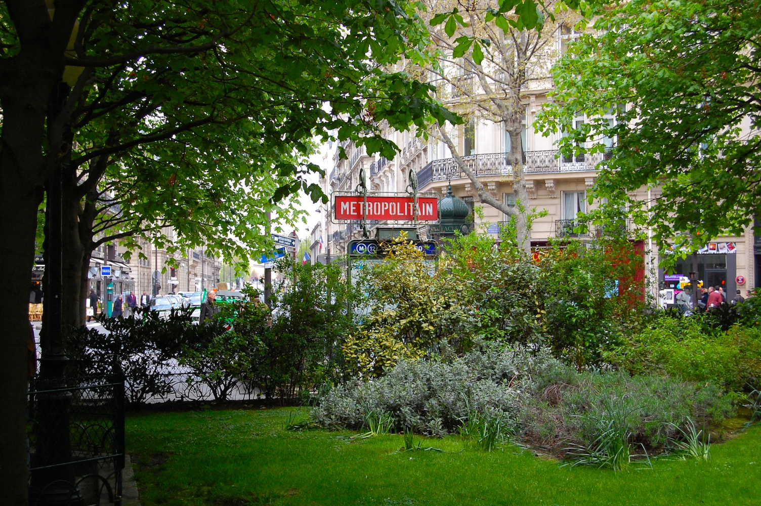 Vue de la station Solférino (7ème arrondissement de Paris) depuis la place Jacques Bainville.